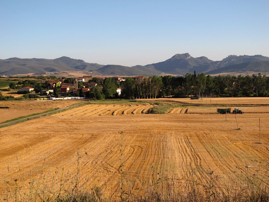 Vista del pueblo de Comunión (Álava) y de los Montes Obarenes y el valle de Miranda de Ebro detrás